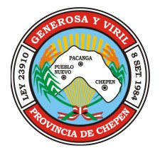 Escudo de Chepén